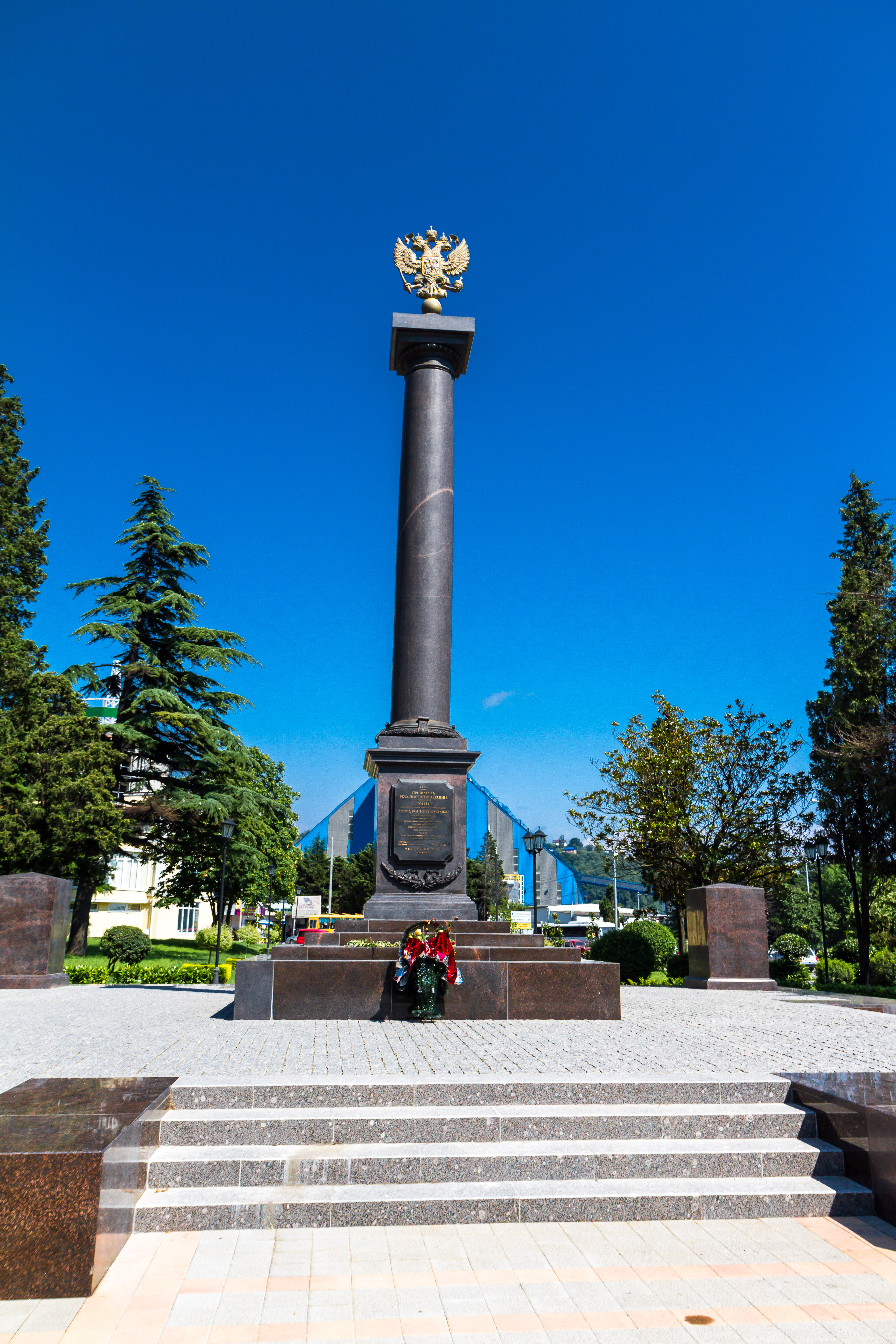 Tuapse, Krasnodar Krai, Russia